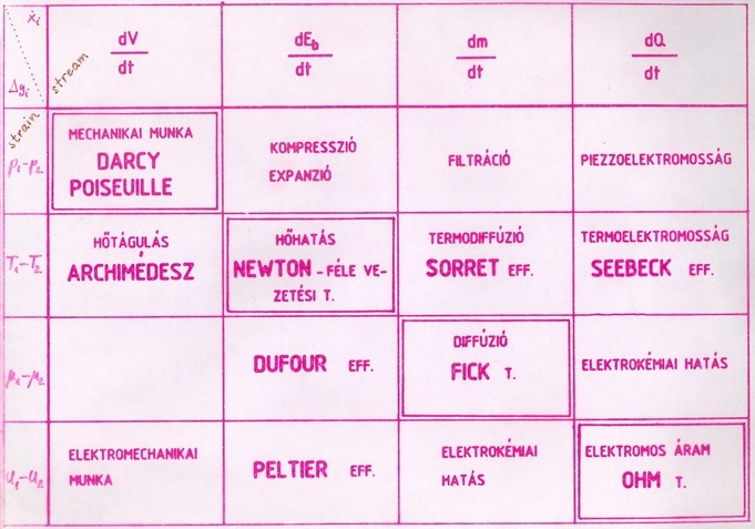 Egyszerűsített Onsager relációs táblázat